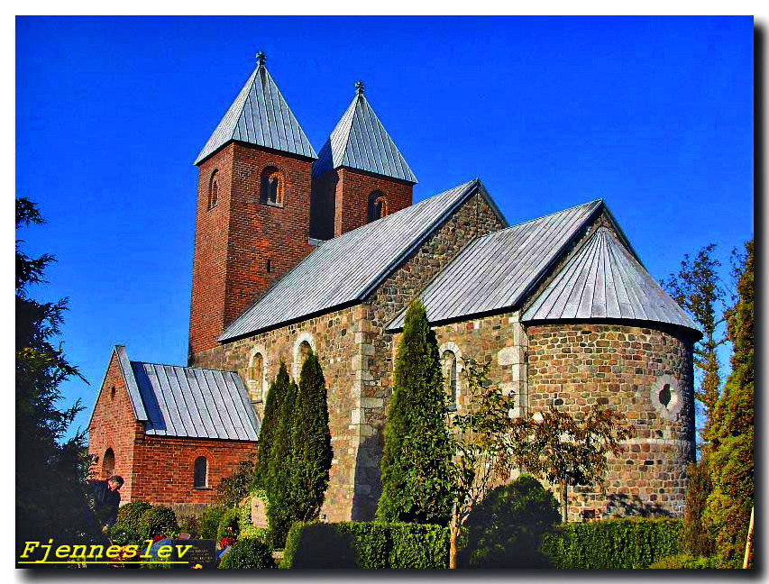 fra sydøst